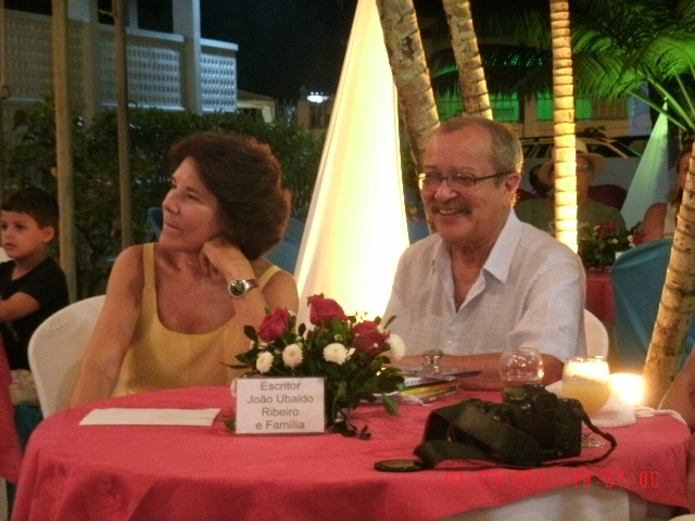 Photo de João Ubaldo Ribeiro et de sa compagne.